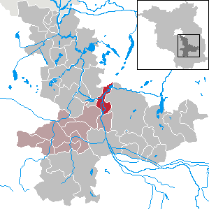 Unterspreewald in Brandenburg (Country) - District Dahme-Spreewald